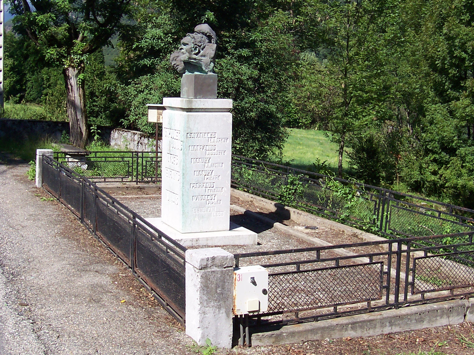 Monument aux morts de Capoulet-et-Junac, oeuvre du sculpteur Antoine Bourdelle intitulée "Les trois têtes hurlantes", ou encore "La Guerre, les figures hurlantes"